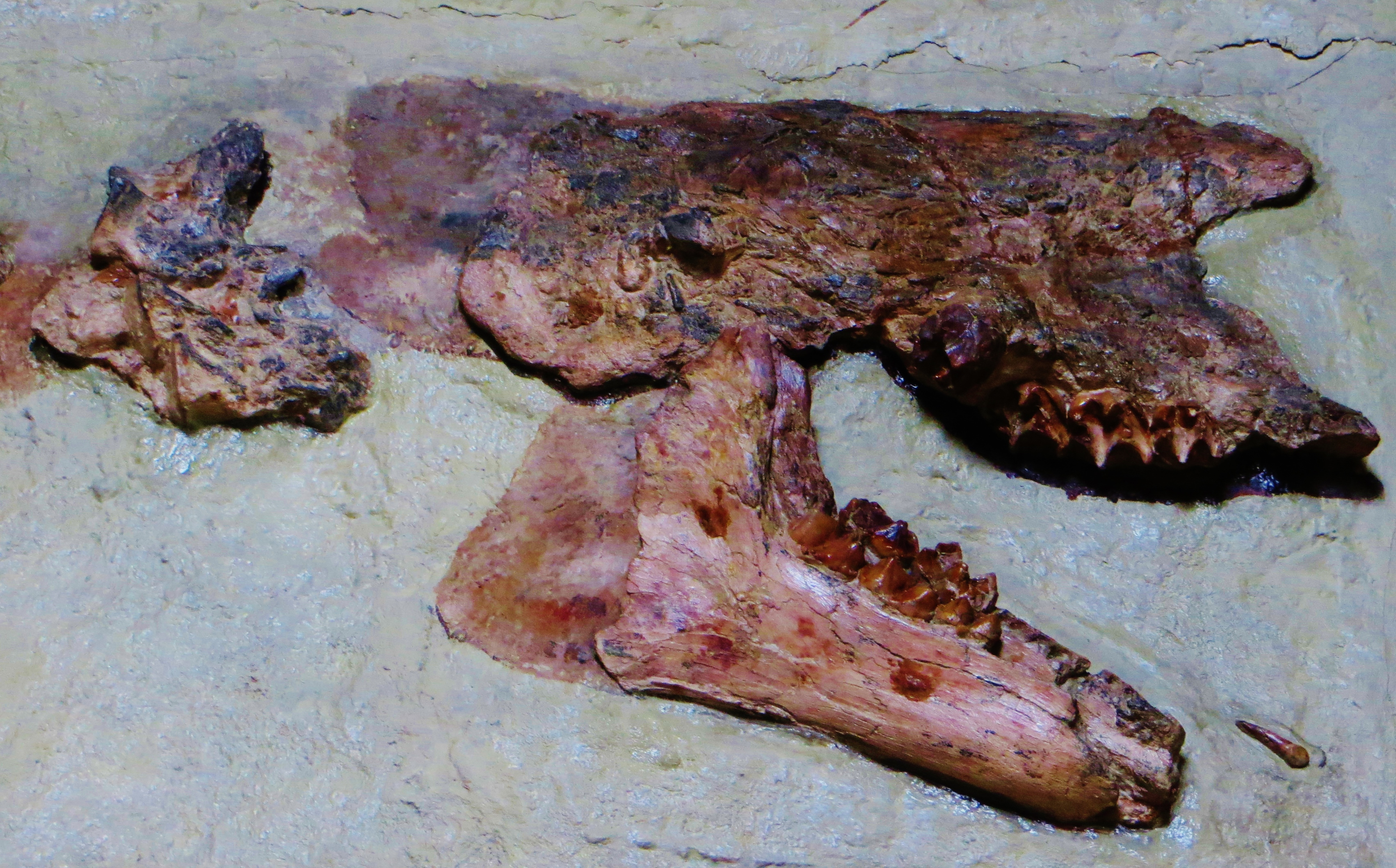 Fossil of Anisodon, an extinct mammal- Took the photo at Musee d'Histoire Naturelle, Paris